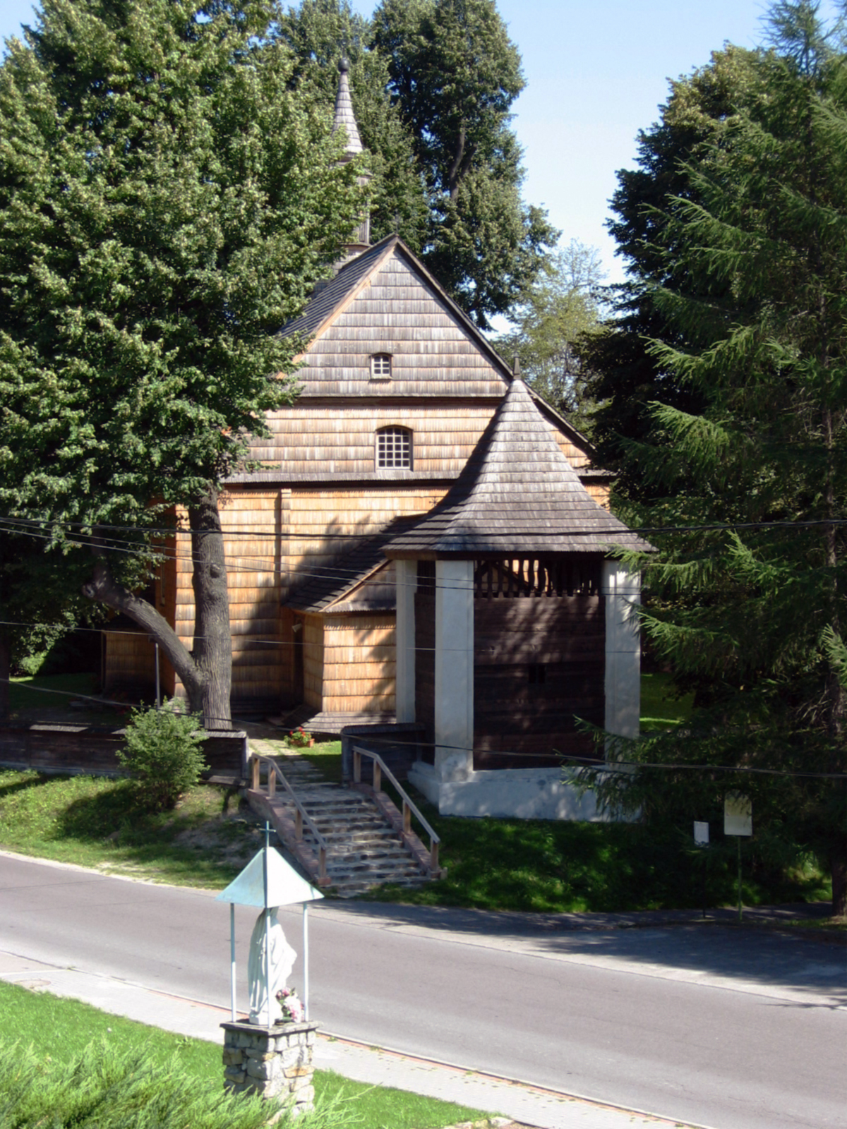 Krzemienica - Kościół - zabytek